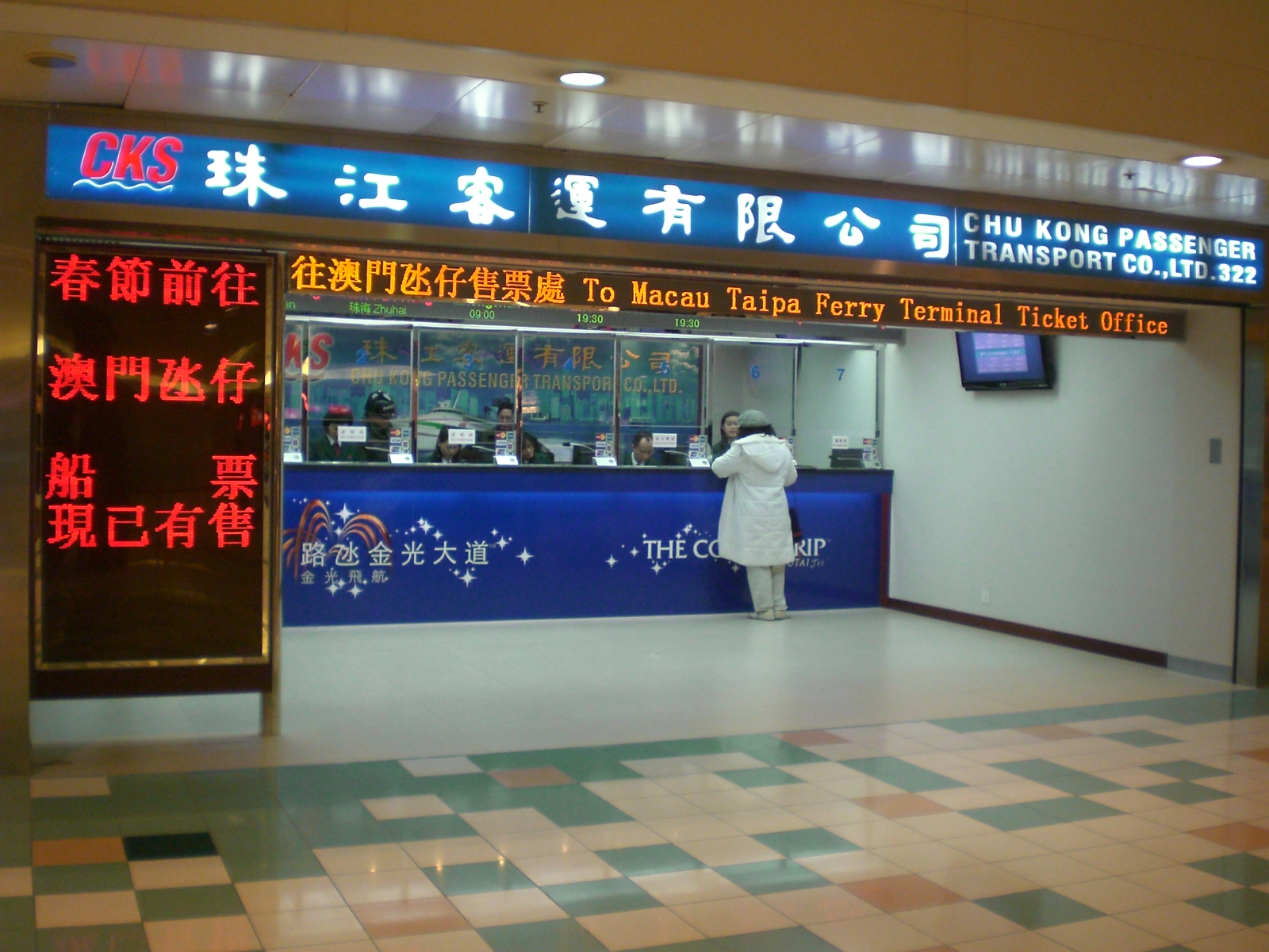 金光飛航 珠江船務 港澳碼頭 (香港) 信德中心